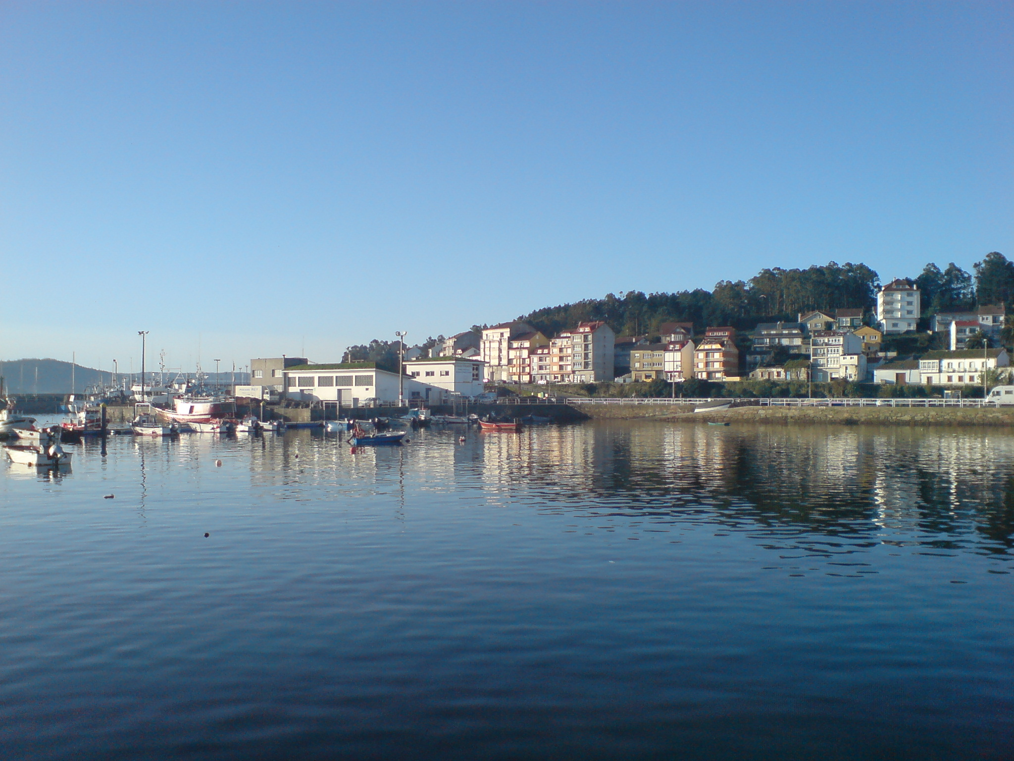 Vista de Camariñas